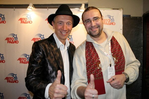 Savage (Роберто Дзанетти) и журналист "Нового Взгляда" Василий Козлов